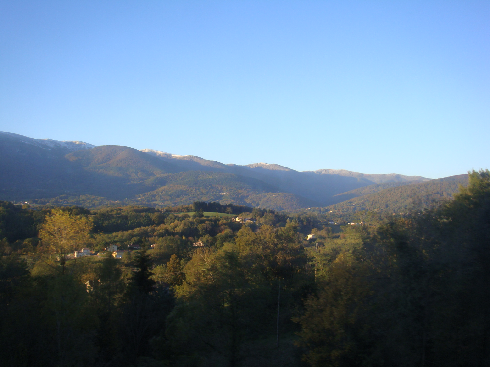 Widok od strony północno-wschodniej